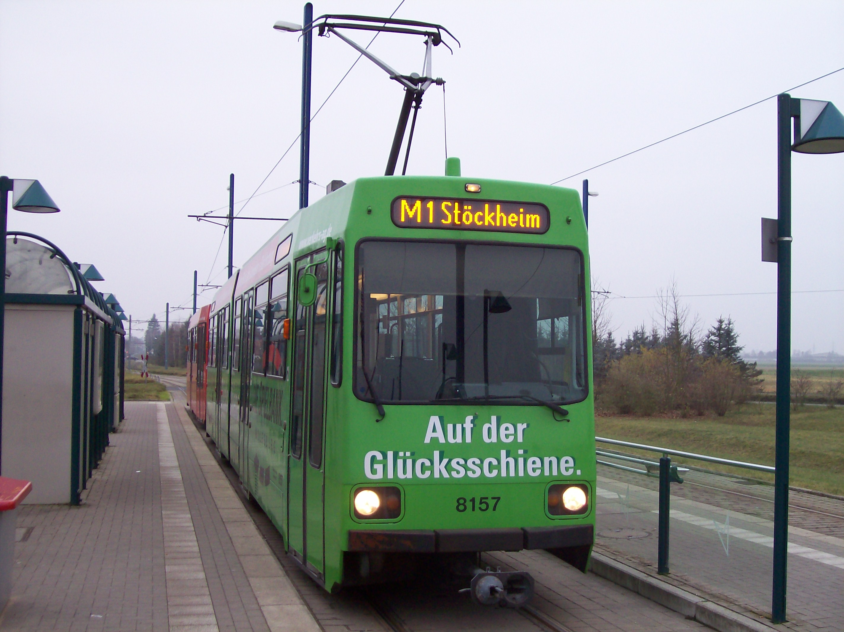 Braunschweiger Verkehrs-AG: 8157 (LHB-GT 6 und B 4) in Wenden, Heideblick